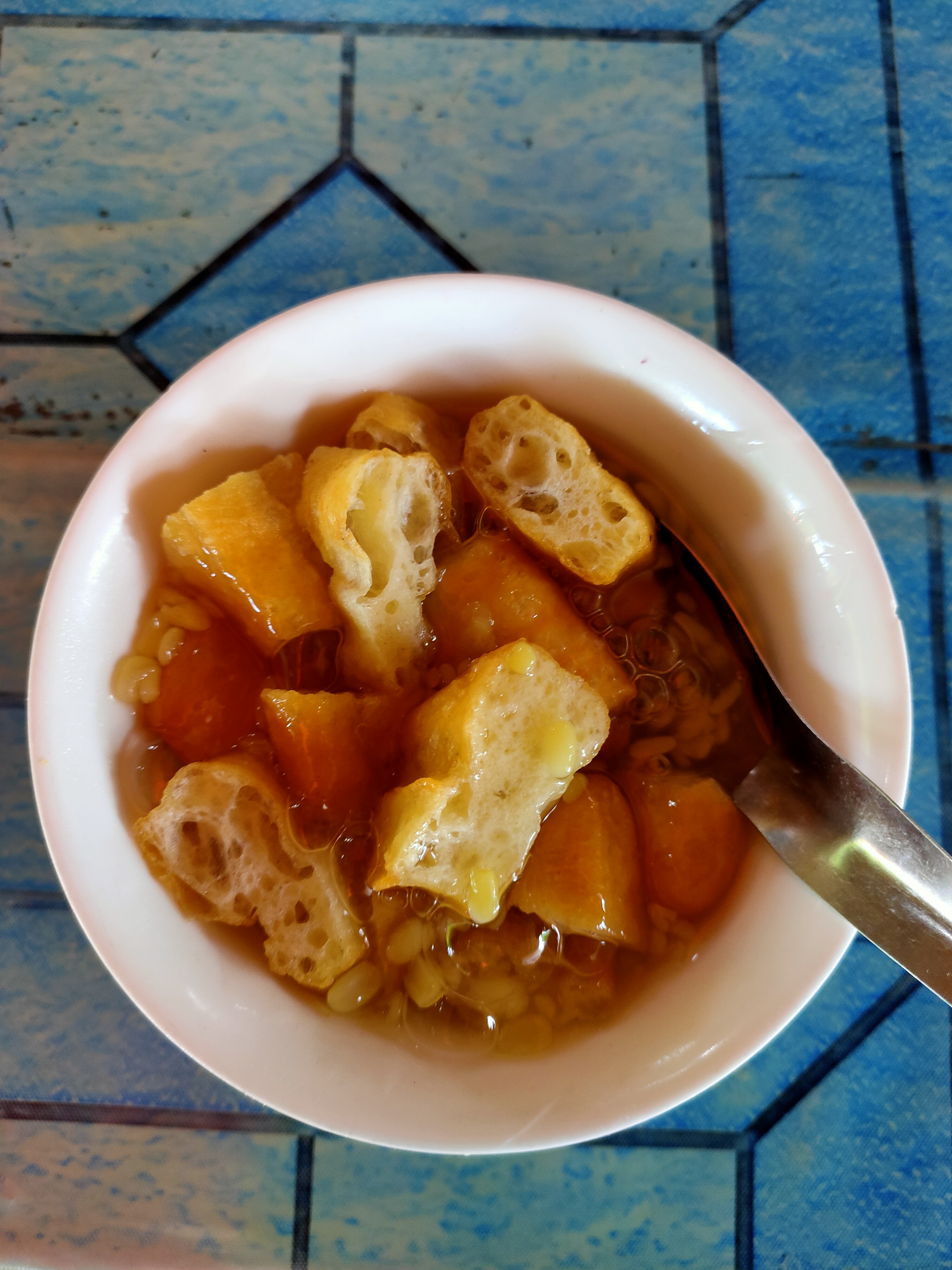 Bubur Gunting Singkawang, Kalimantan Barat.